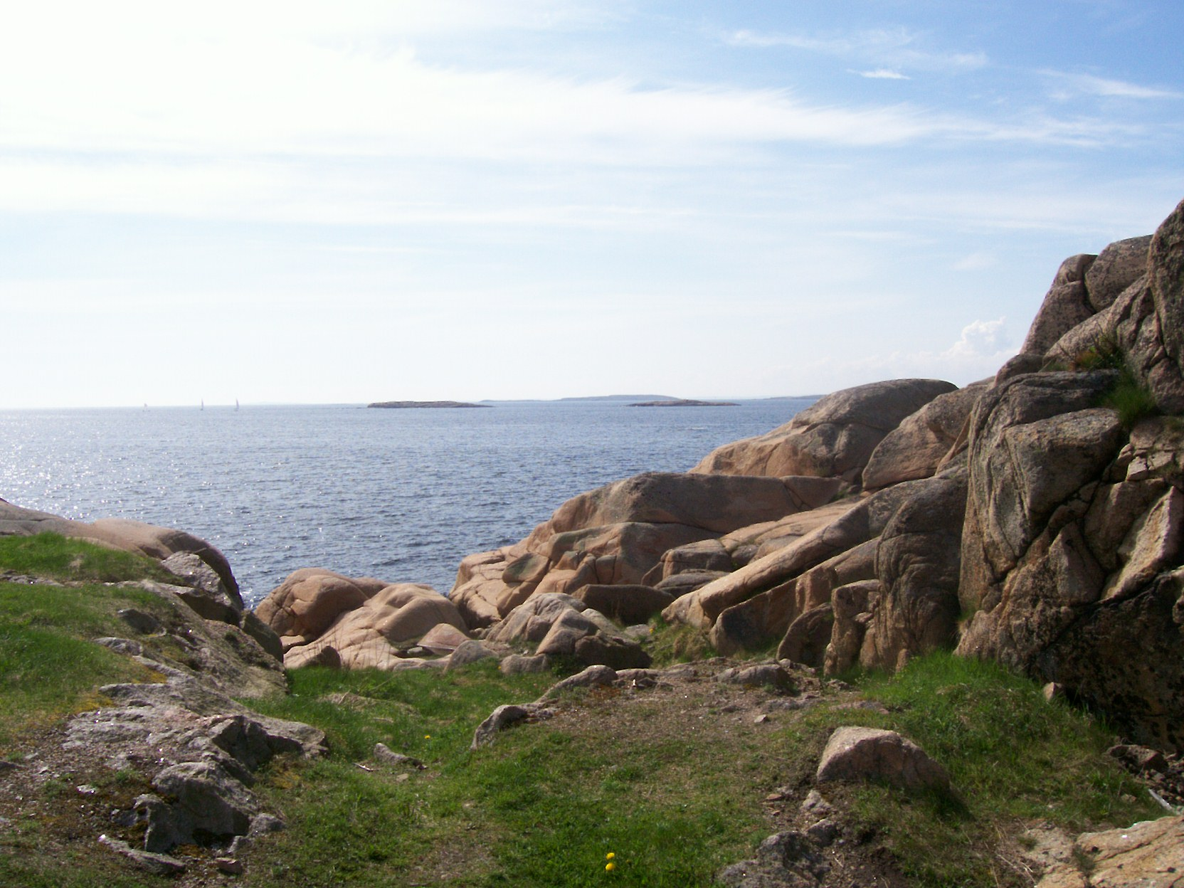 Svaberg Mærrapanna, retning Hankøsundet.